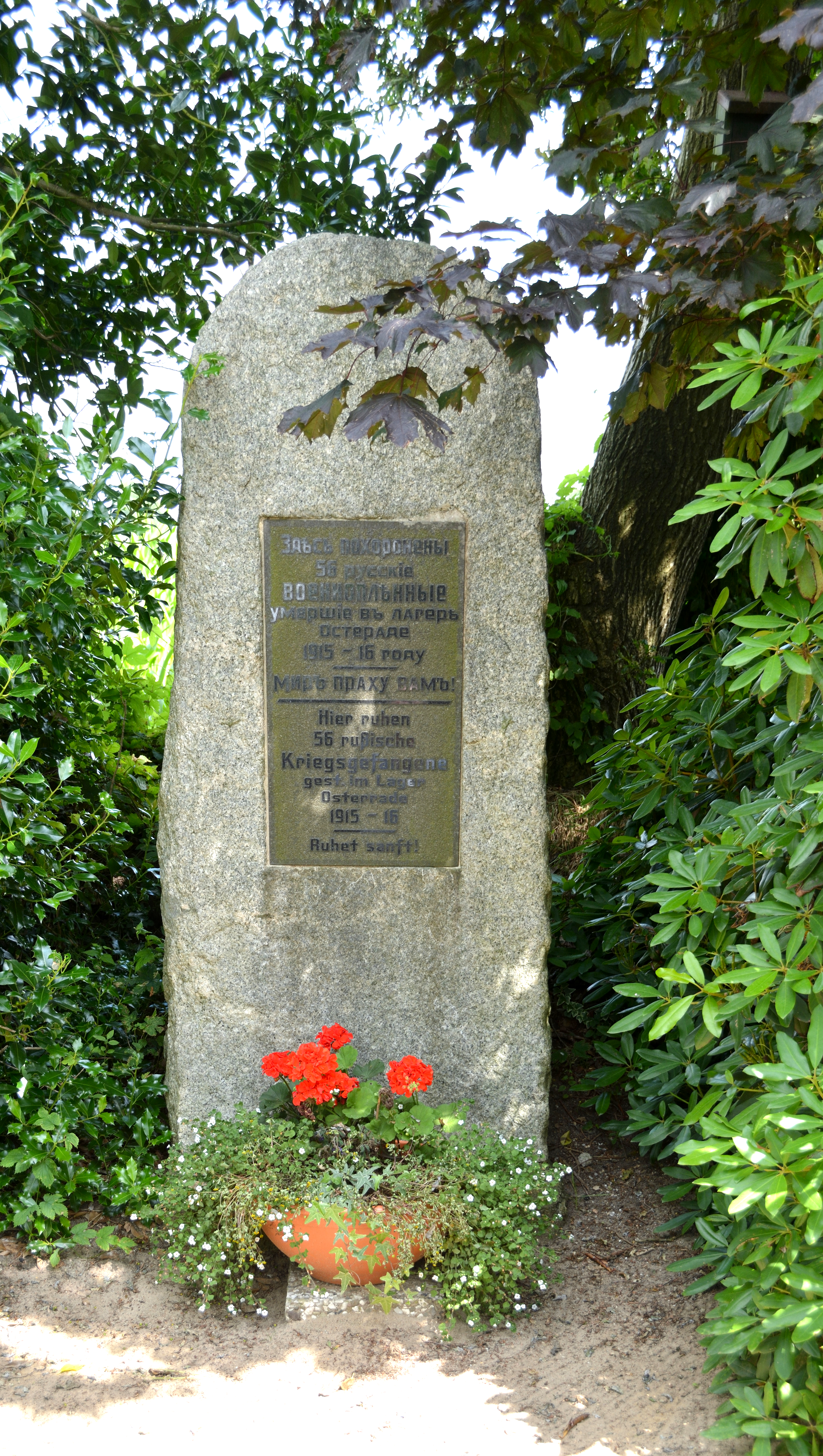 Gedenkstätte für die während des ersten Weltkriegs im Arbeitslager Süderrade gestorbenen russischen Kriegsgefangenen.